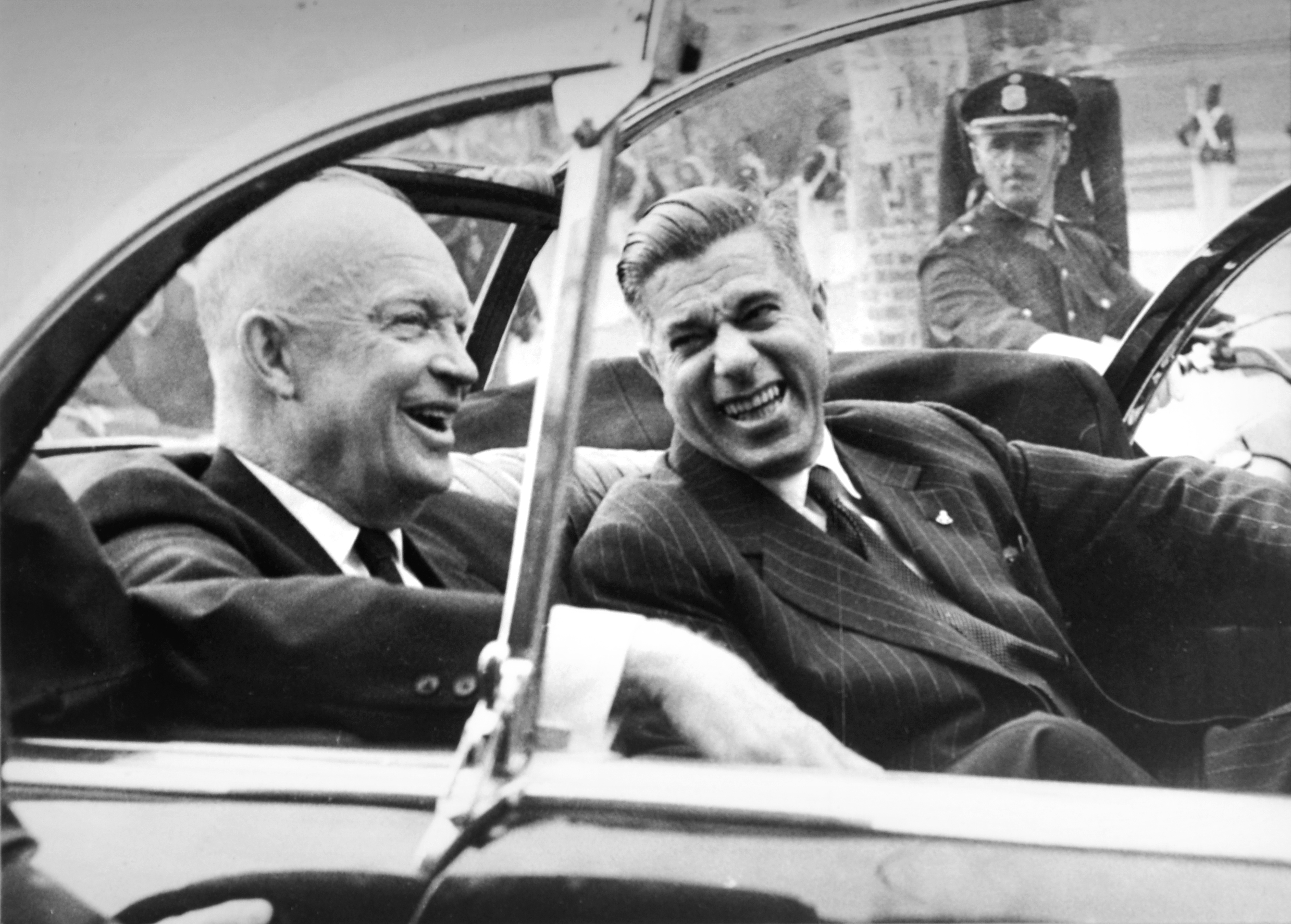 Visita del presidente Dwight D. Eisenhower, 2-3 de marzo de 1960. Eisenhower fue recibido por el entonces presidente del Consejo Nacional de Gobierno, Benito Nardone. President Dwight D. Eisenhower's goodwill visit to Uruguay, March 2-3, 1960. Pictured above near Montevideo's Plaza Independencia with Uruguay President Benito Nardone. [U.S. Embassy photo by Francisco Bonfiglio]